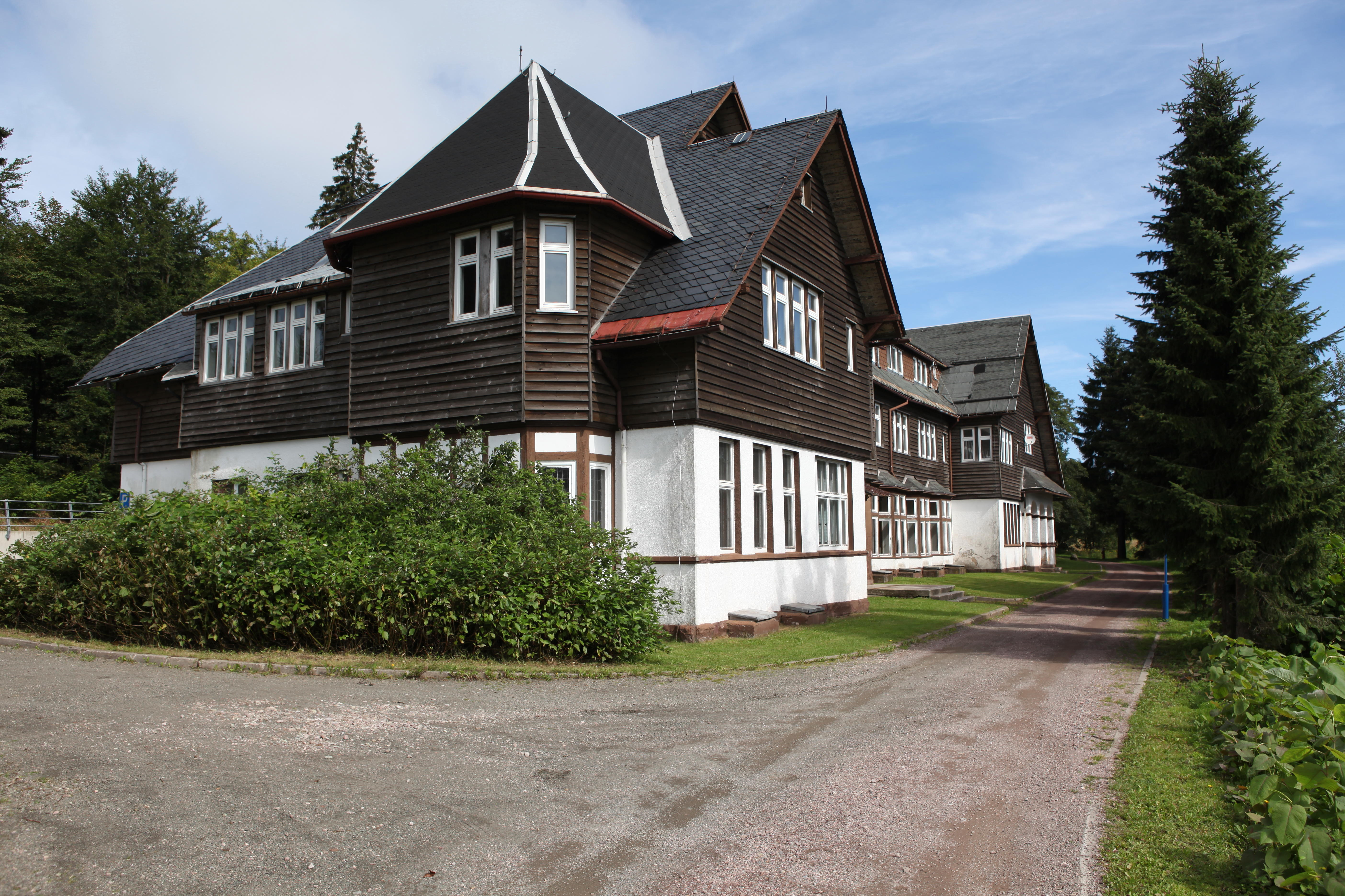 Ehemaliges Golfhotel von 1912 in Oberhof